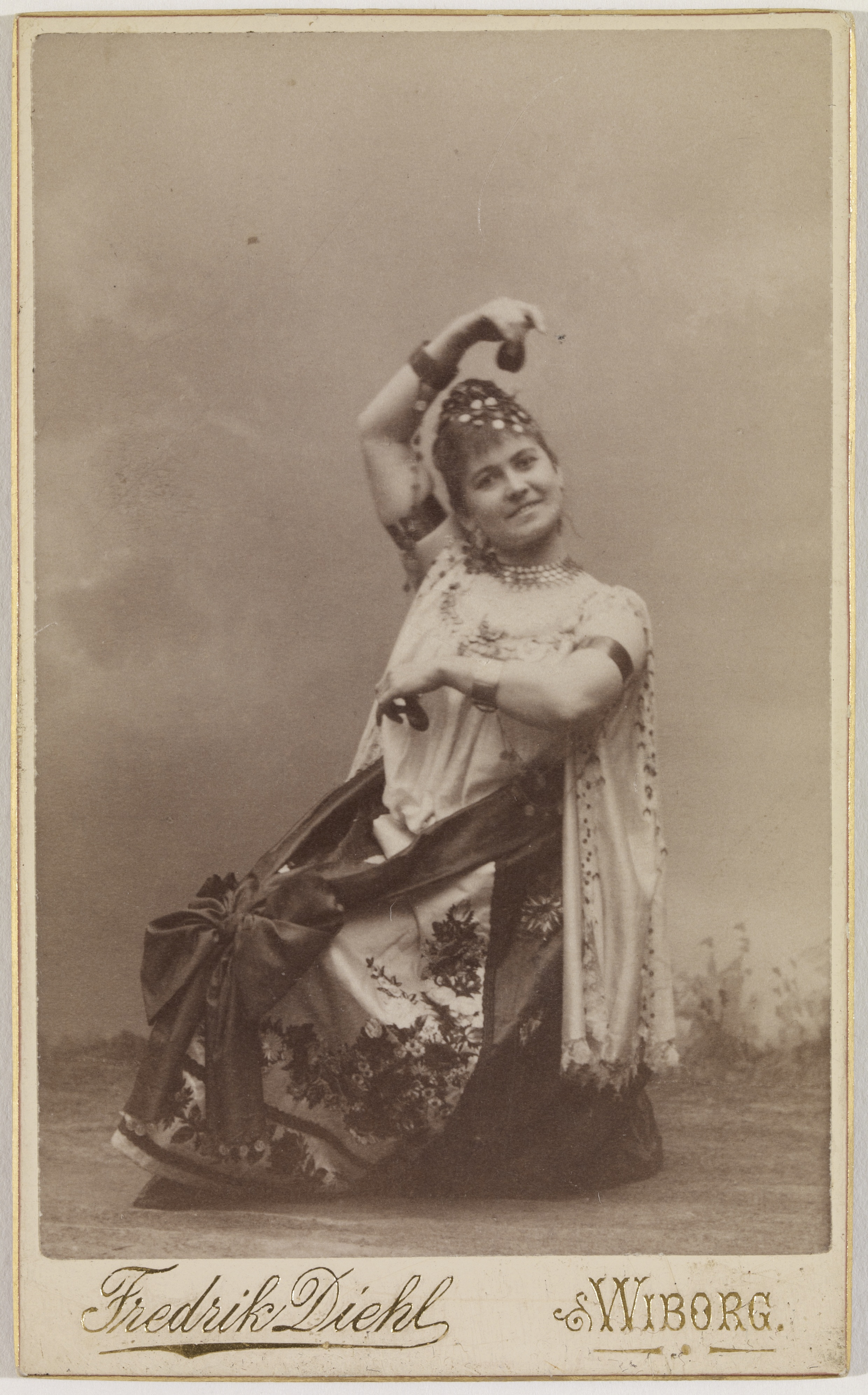 Emma Engdahl-Jägerskiöld; pysty, mustavalkoinen